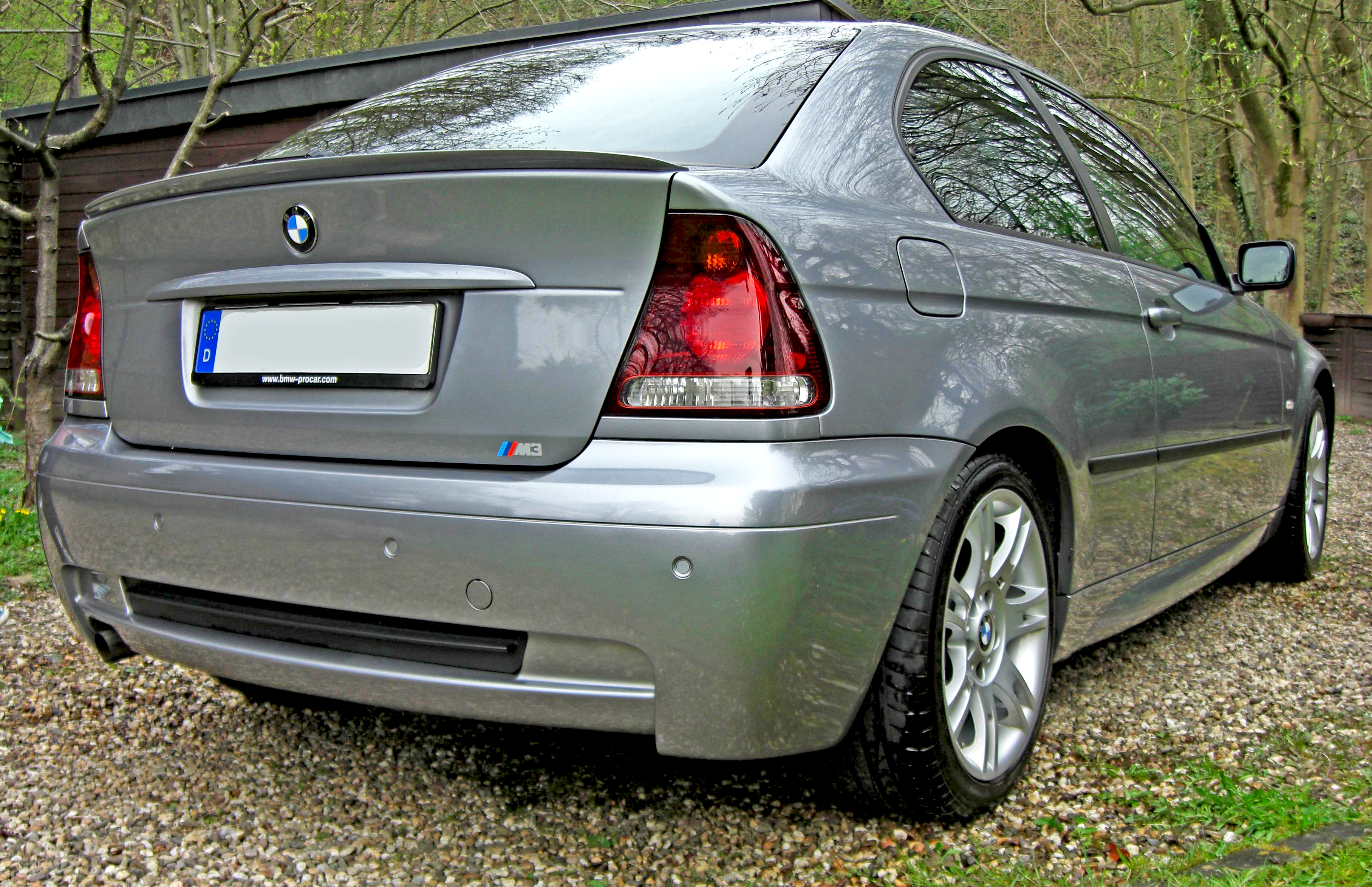 BMW 316ti M-Paket